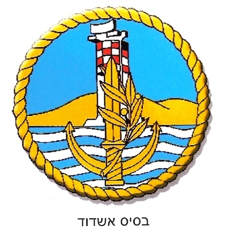 סמל בסיס אשדוד של חיל הים